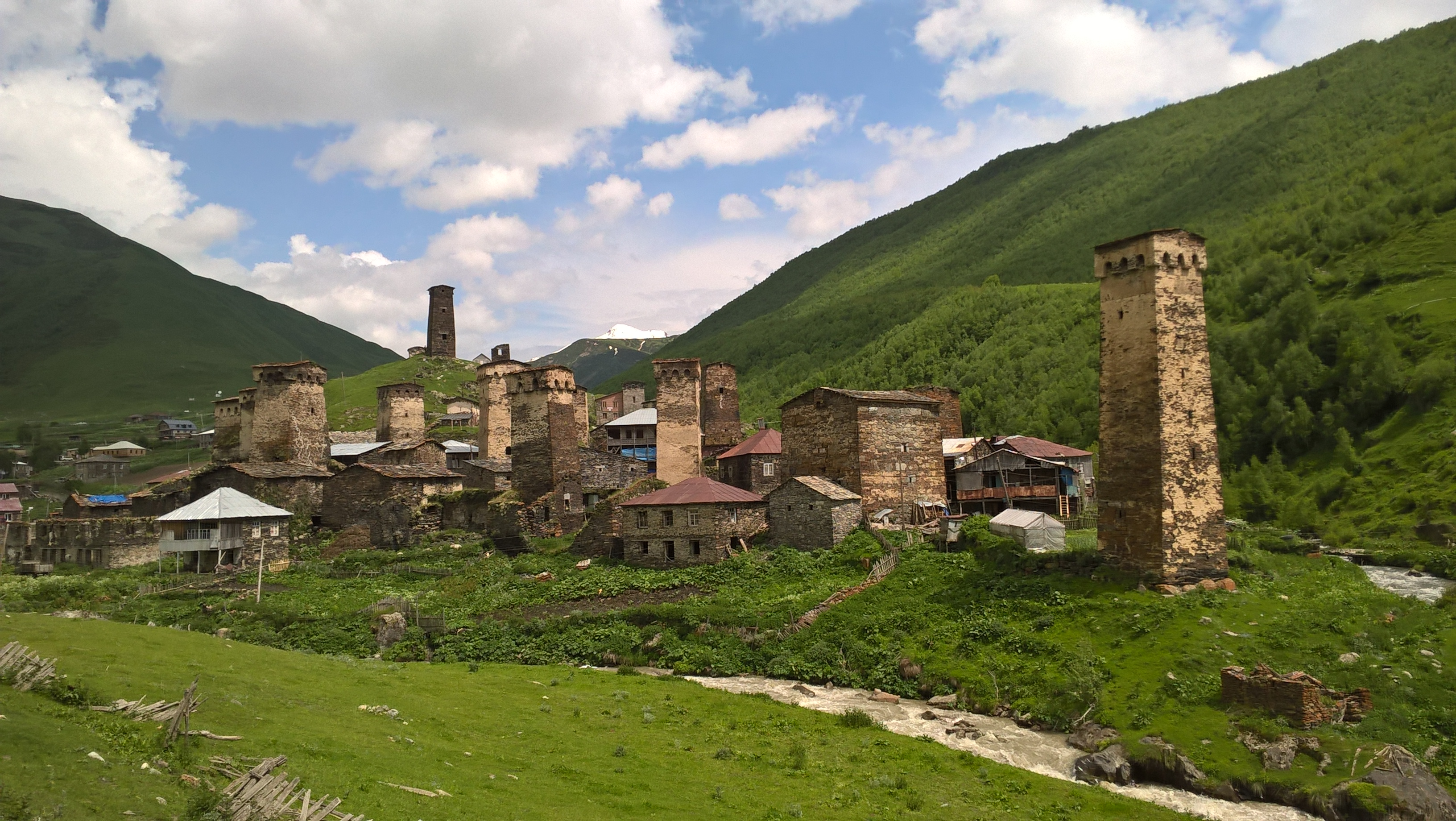 სოფლის განაშენიანება